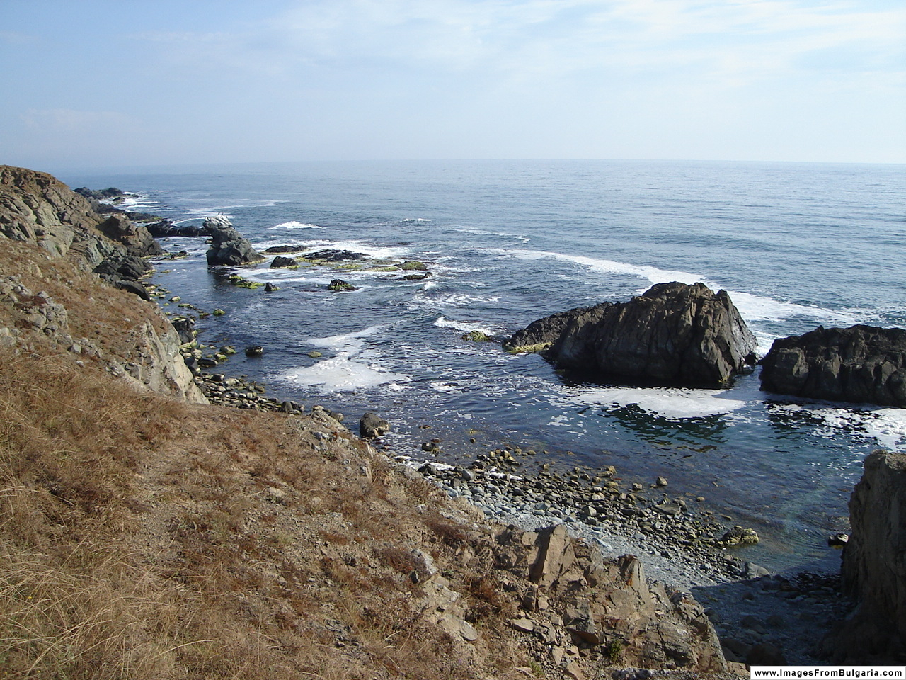 Rezovo, Burgas Province, Bulgaria This file, which was originally posted to , is licensed under Creative Commons Attribution 2.5 License. Attribution: Nikolay Rainov In short: you are free to distribute and modify the file as long as you attribute its author(s) or licensor(s). Check for other images from this website. Този файл, оригинално качен на сайта , е лицензиран под условията на лиценза Creative Commons Признание 2.5. Признание: Nikolay Rainov Накратко: имате свободата да разпространявате и променяте файла, стига да посочвате неговия (неговите) автор(и) или лицензодател(и). Разгледайте други картинки от този уебсайт.